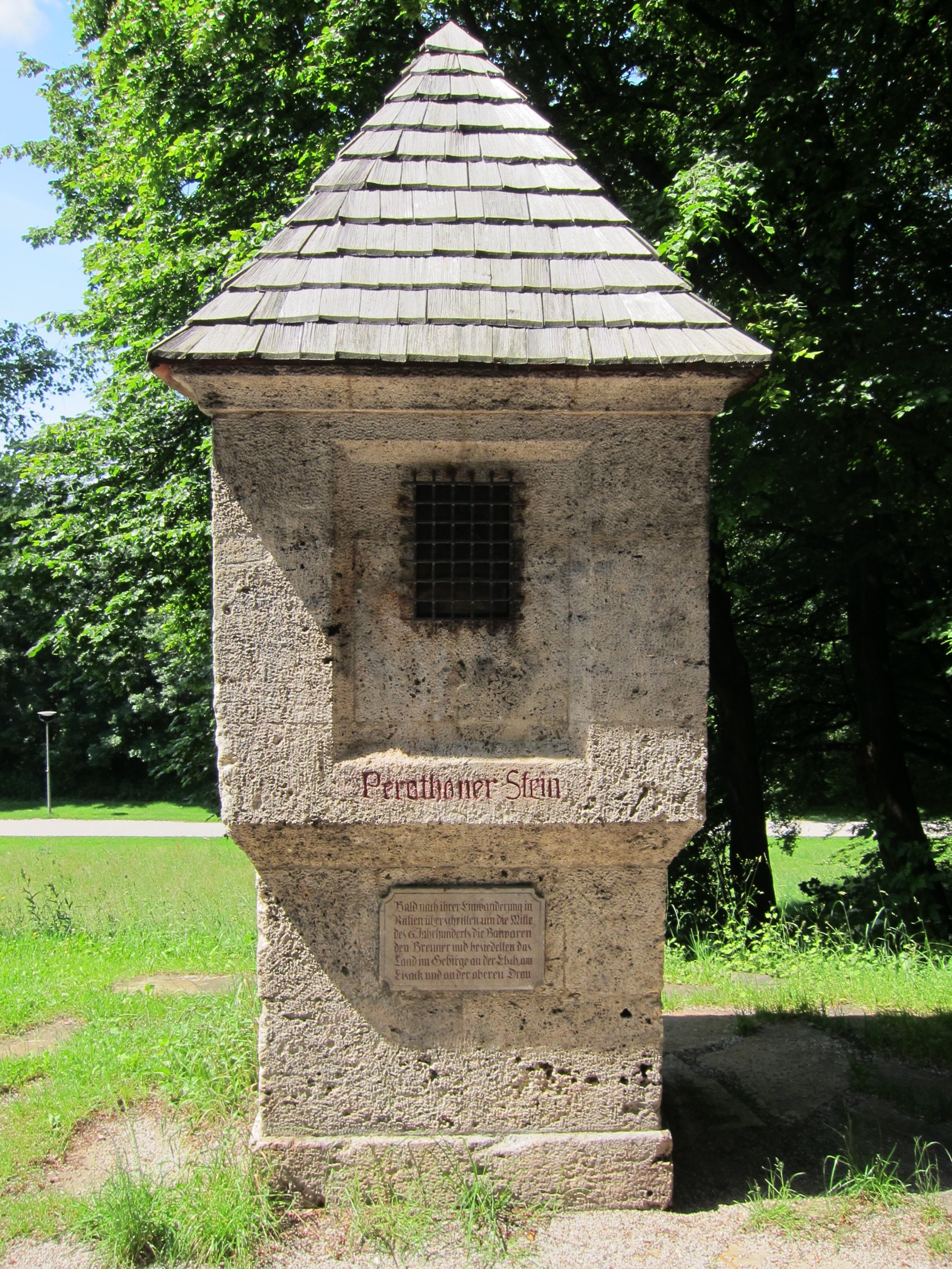 Perathoner Stein, bildstockartiges Denkmal für Dr. Julius Perathoner, 1927 von August Blößner und Ludwig Dasio; in Grünanlage Kuntersweg nahe St.-Magnus-Straße/Tiroler Platz.